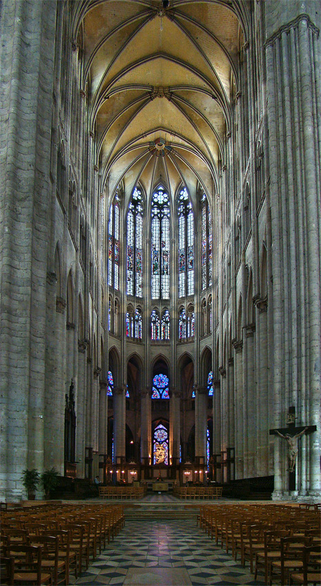 Cathédrale Saint-Pierre de Beauvais, Oise, Picardie, France.